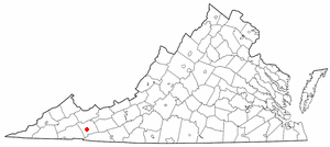 va maps